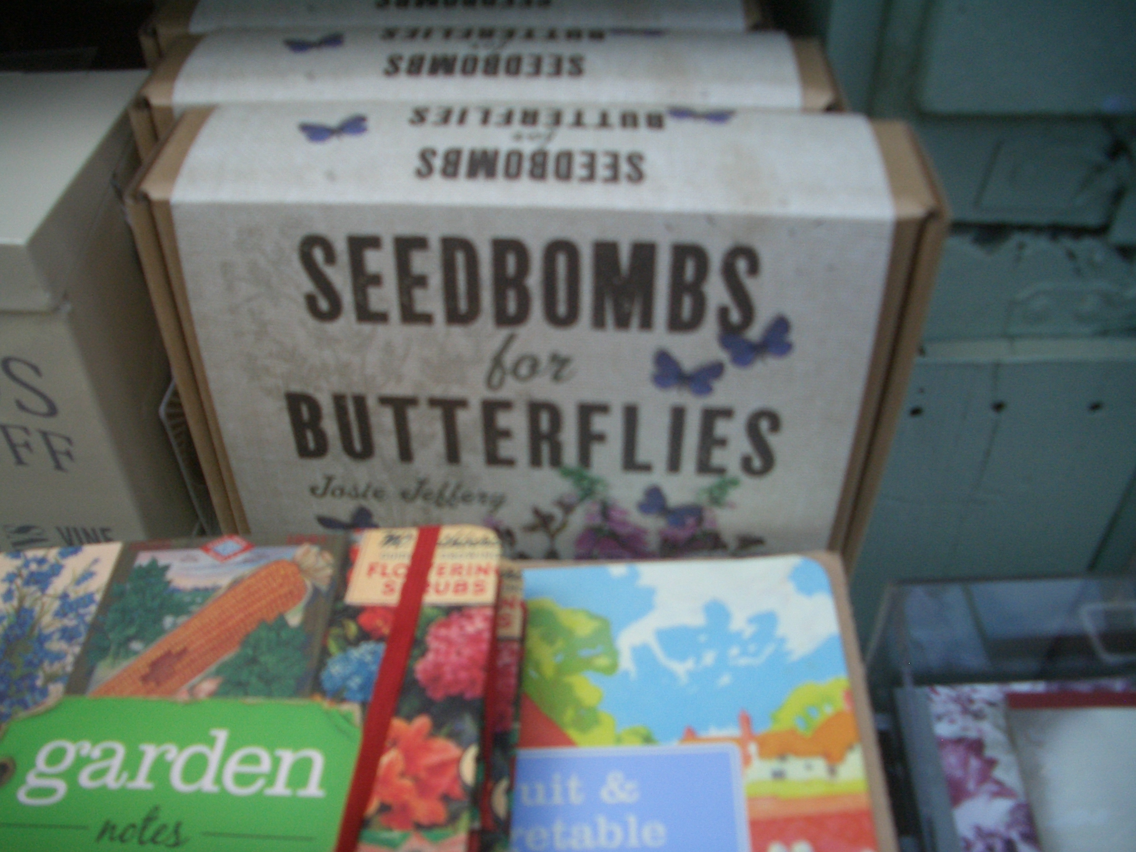 Samenbombe, Chelsea Physics Garden, Museum Shop